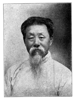 中文（台灣）: 中華民國國會議員